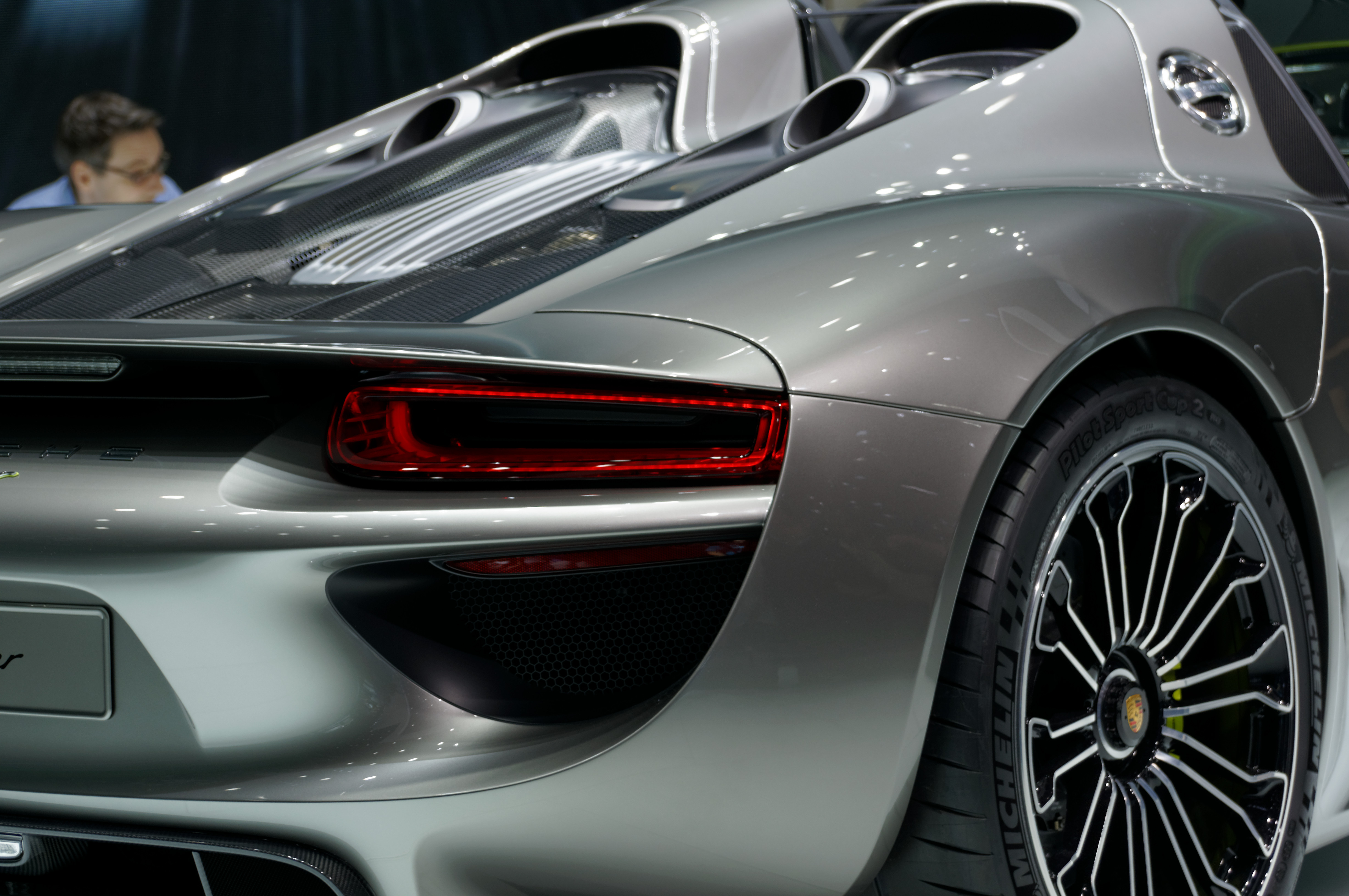 DSC02009_DxO